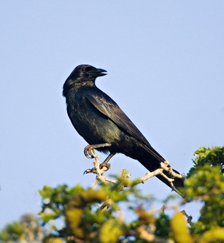 Corvus imparatus